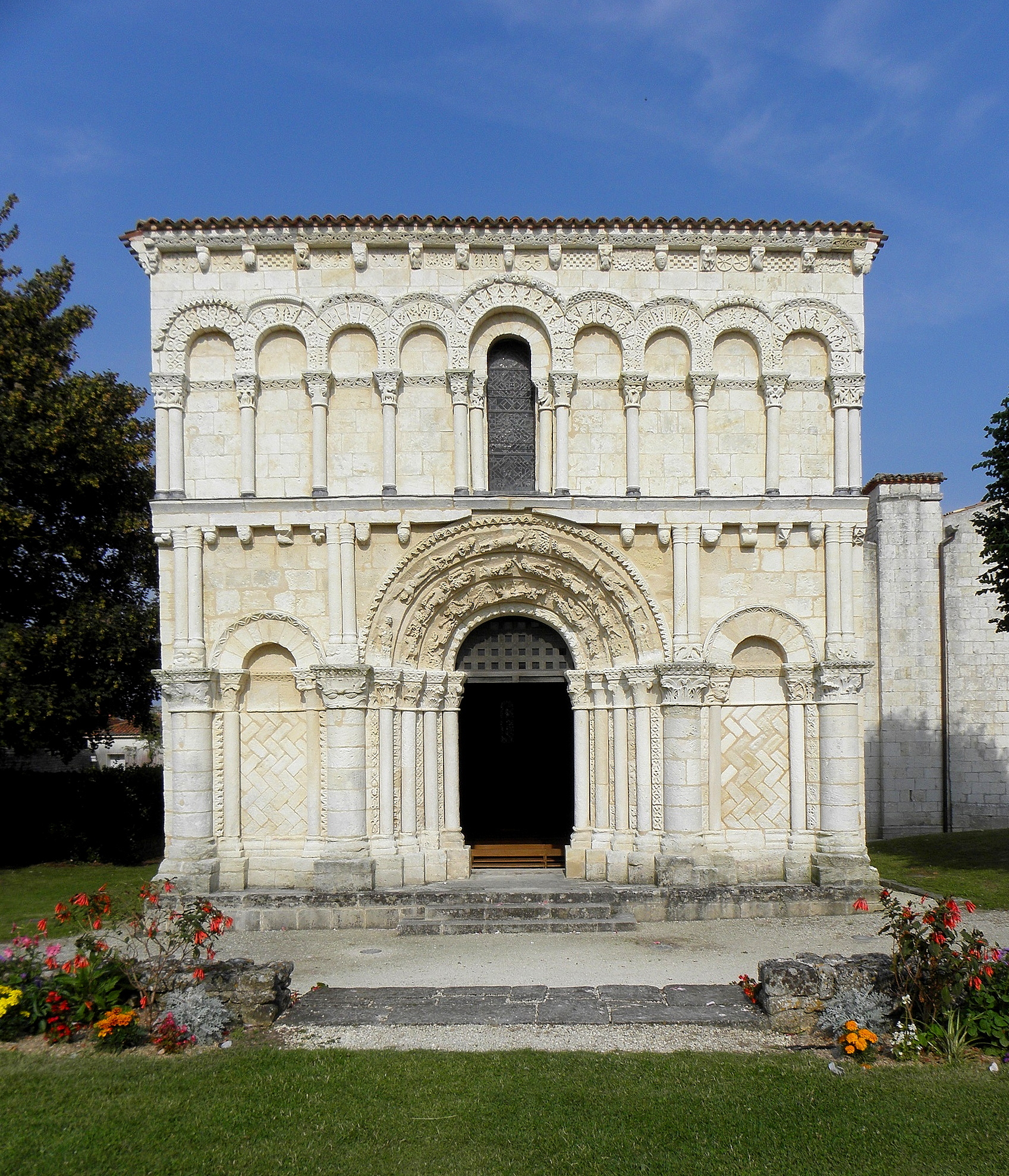 Église Notre-Dame d'Échillais (17). Façade occidentale.